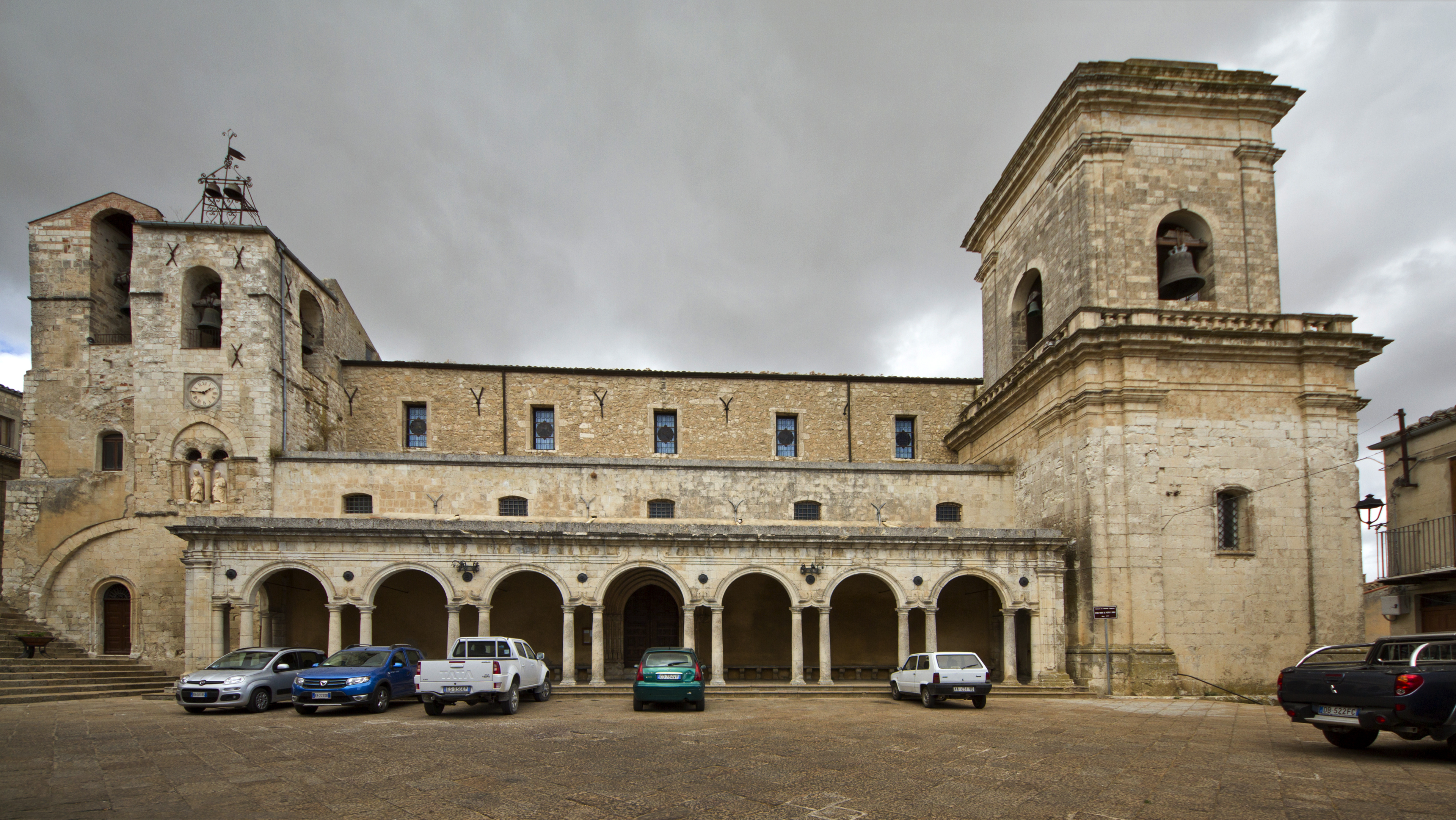 Chiesa Madre SS. Pietro E Paolo, Petralia Soprana PA, Sicily, Italy